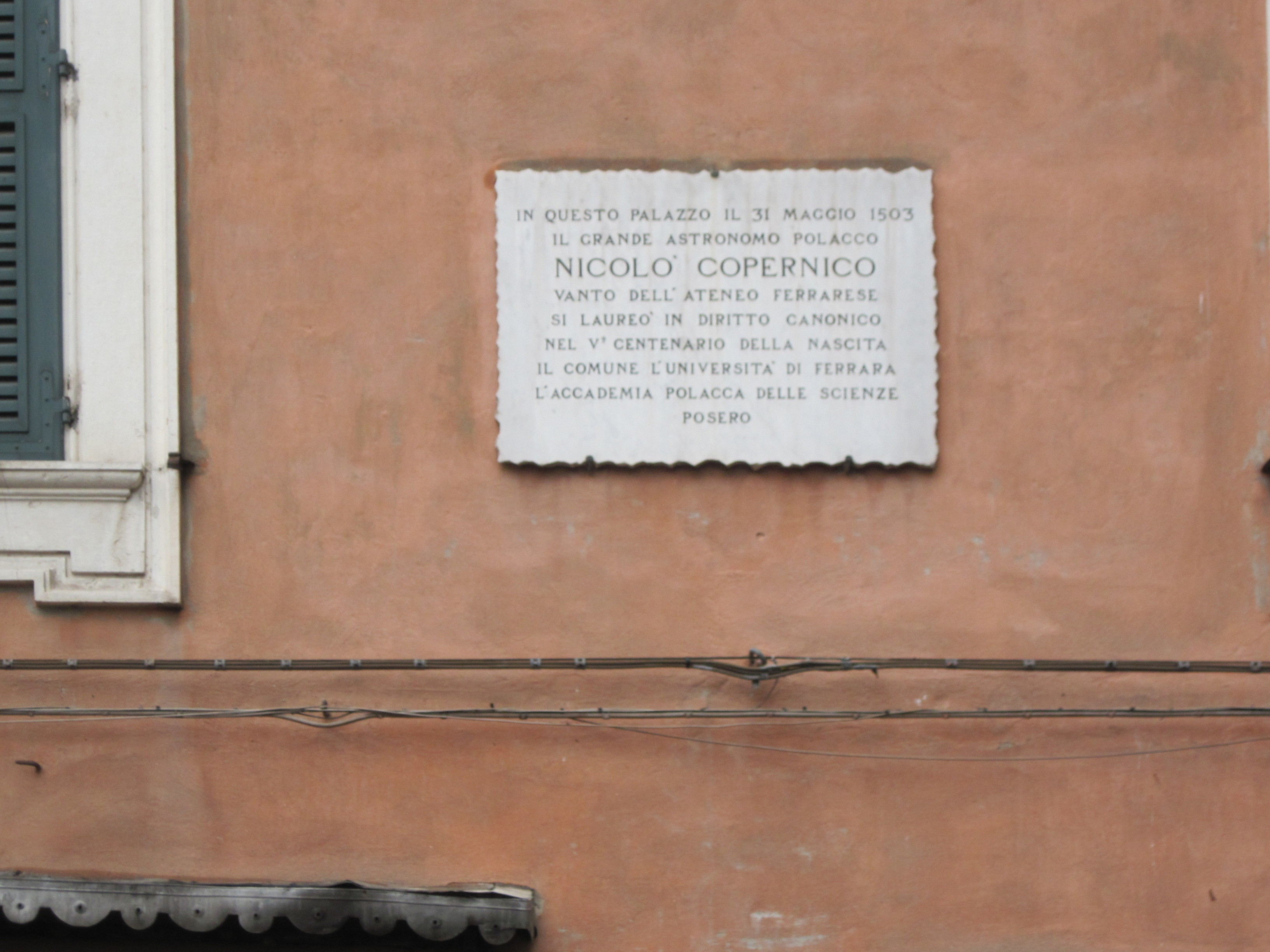 Piazza Duomo Ferrara - Palazzo Arcivescovile con lapide a ricordo di Niccolò Copernico